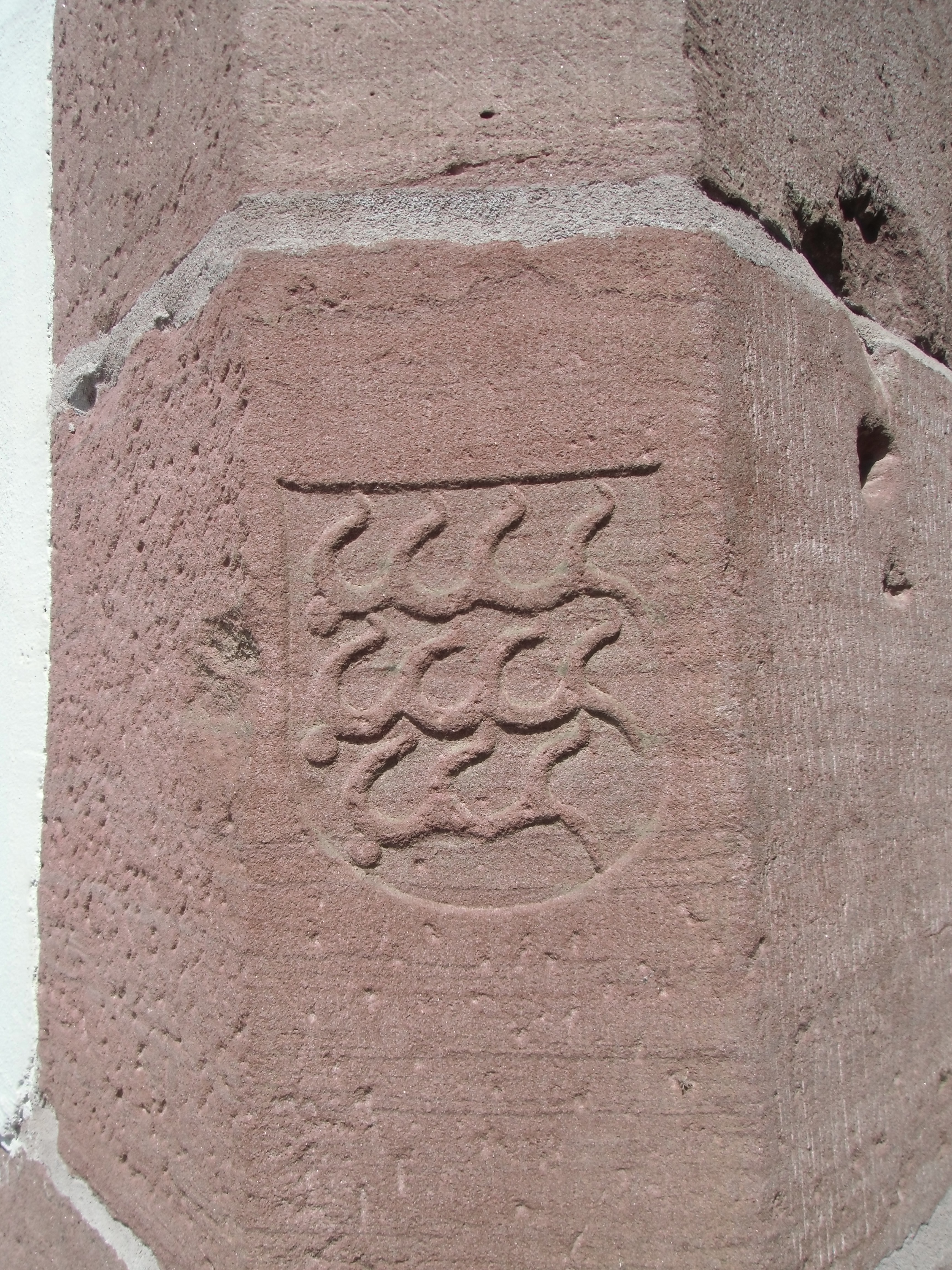 Württemberger Wappen am Turm der Evang. Kirche in Ebhausen